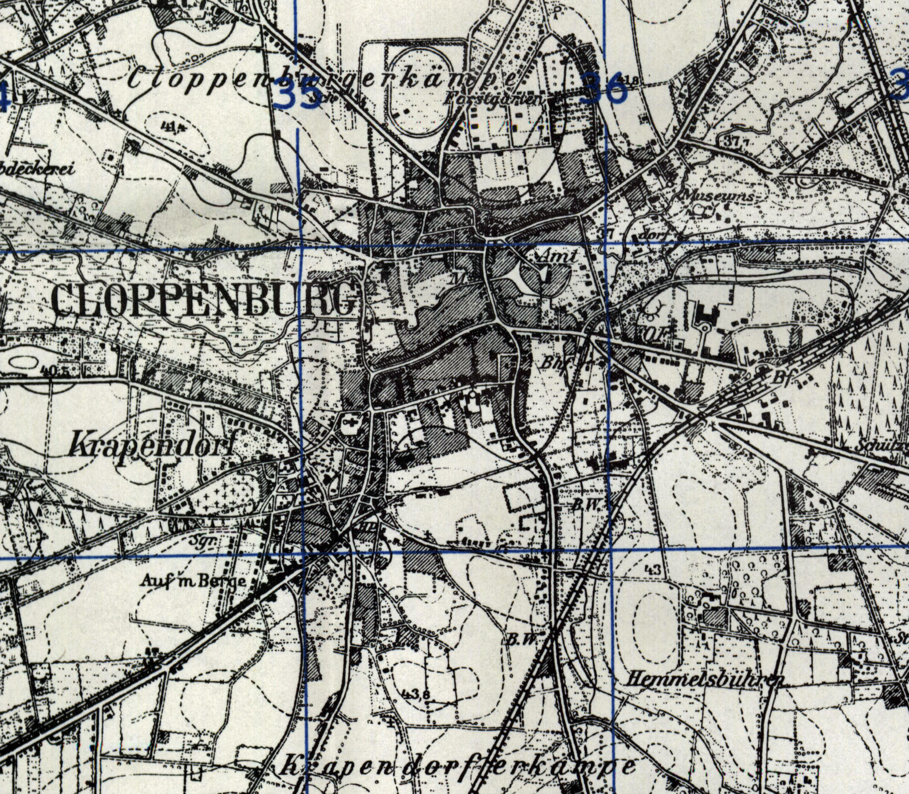 Ein Satz von topographischen Karten vor dem Zweiten Weltkrieg Deutschland, ursprünglich von der deutschen Regierung gedruckt, wurden von den Briten und US-Militärs nach dem Krieg beschlagnahmt. Die meisten dieser Karten sind Nachdrucke der British Geographical Section, dem Generalstab, oder dem U.S. Army Map Service. Das Kartensatz enthält mehrere Editionen aus mehreren Jahren und deckt den größten Teil Deutschland [einschließlich Teile des heutigen Polen] der 1930er Jahre ab, aber einige Karten fehlen.